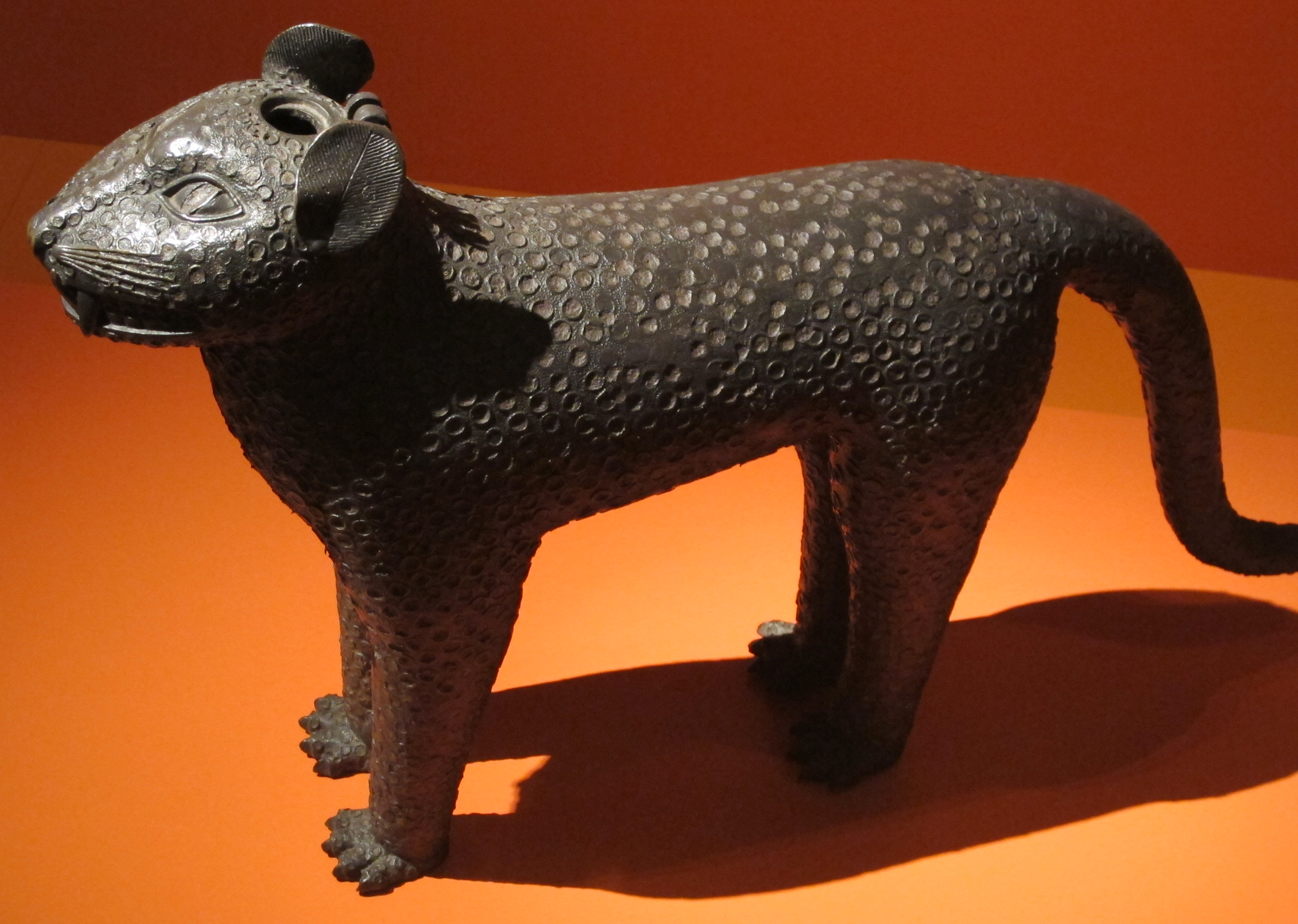 Benin, acquamanile a forma di leopardo, XVIII sec